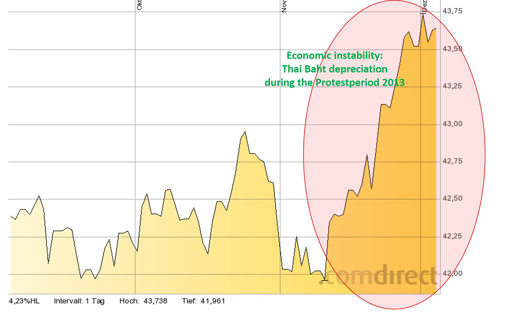 Baht Abwertung während der politischen Unruhe 2013